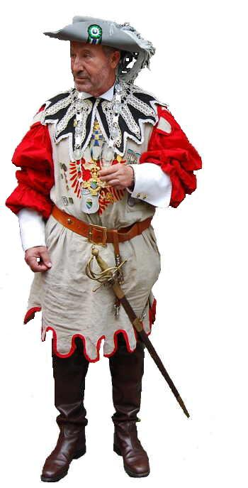 Mitglied der Alten Pankgrafen-Vereinigung von 1381 zu Berlin bey Wedding an der Panke in Großem Ordenskleid